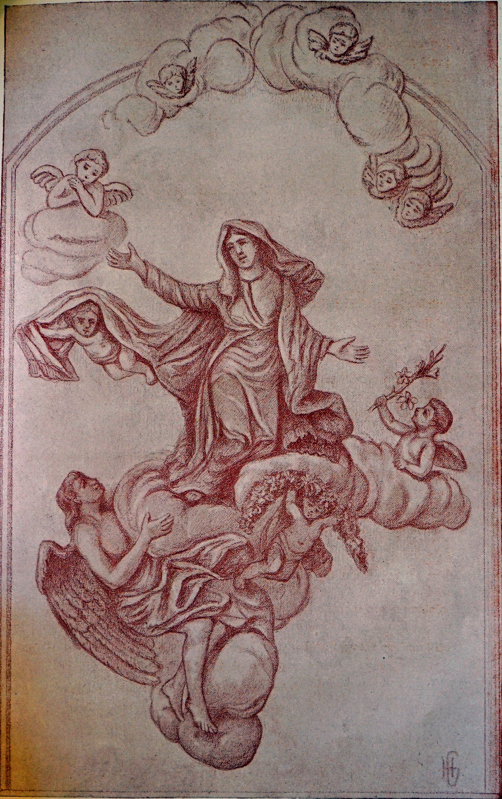 de l'abbaye deBellmont.